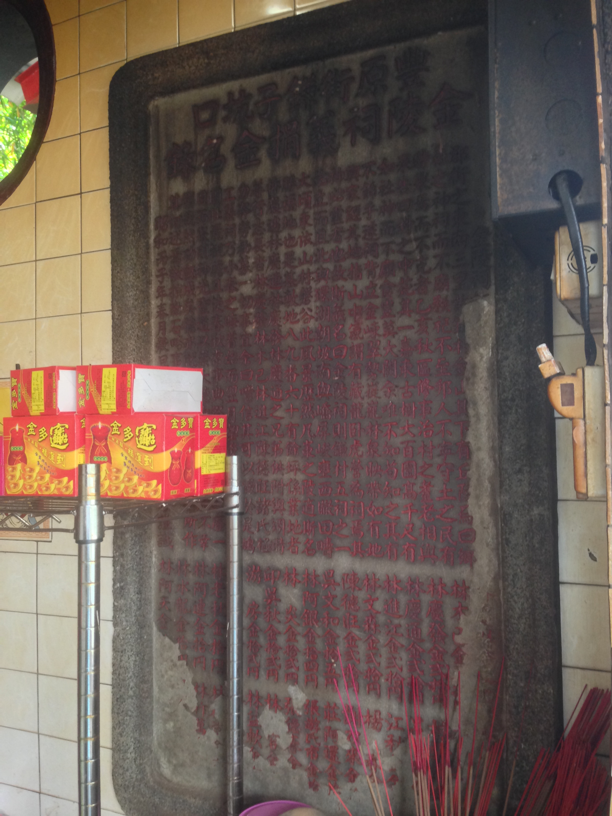 豐原街鐮子坑口金陵祠義捐名錄